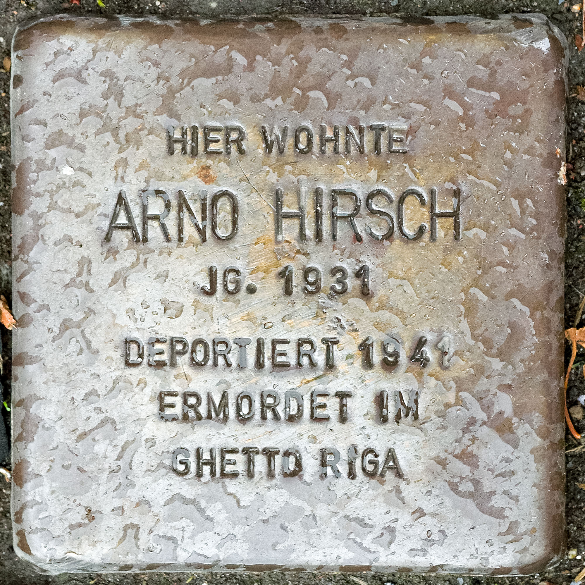 Stolpersteine in Viersen; Hirsch, Arno